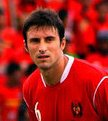 Luciano Theiler - Futbolista